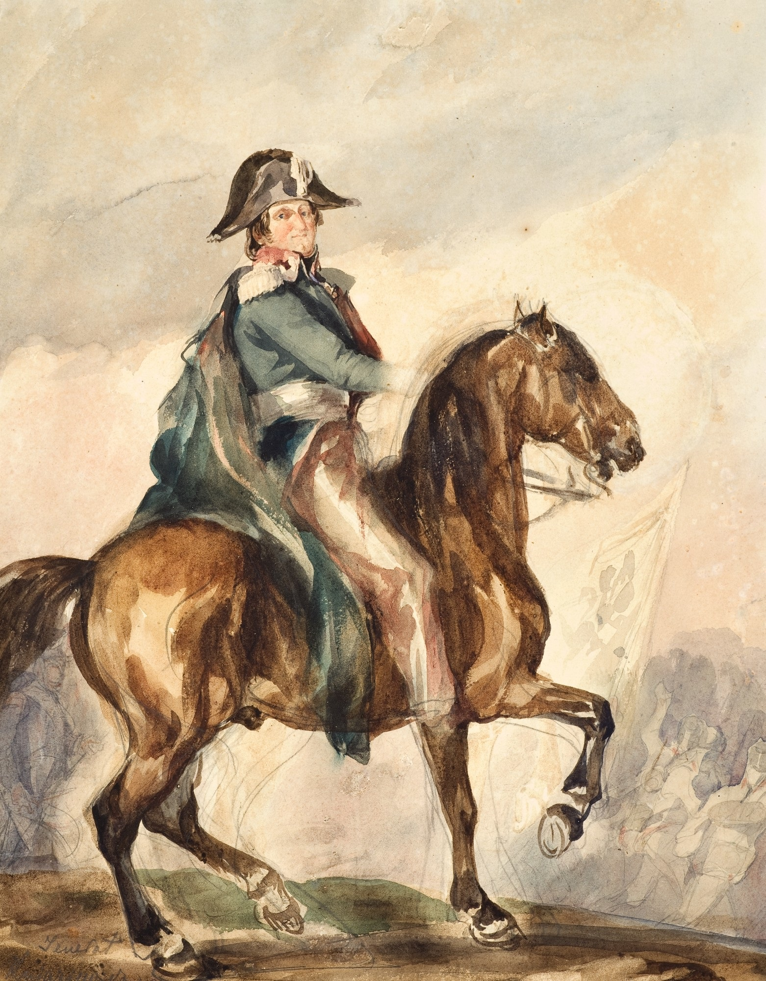 Portret generała Kniaziewicza